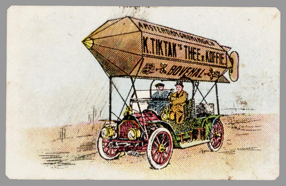 Affiche: Amsterdam Groningen, K. Tiktak's Thee & Koffie bovenal.